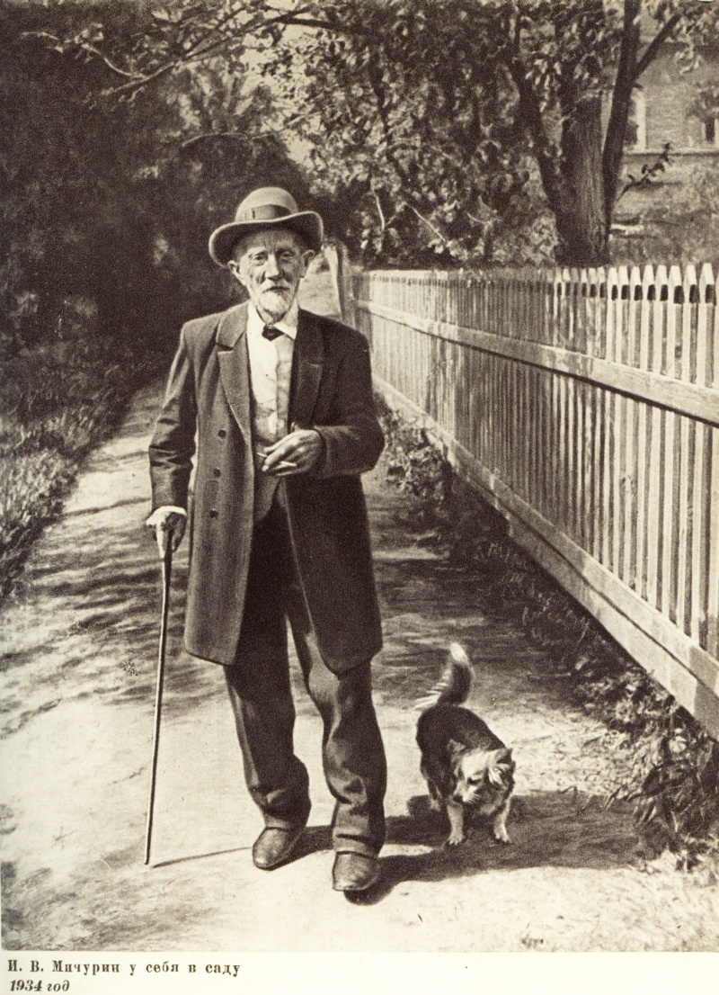 Мичурин у себя в саду, 1934 год